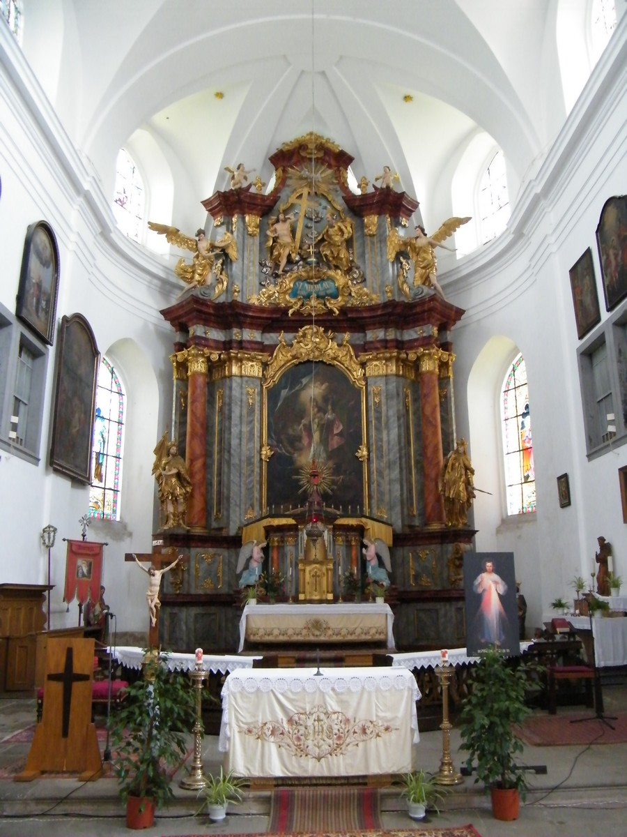 Hlavní oltář v kostele svatého Mikuláše v Mikulášovicích